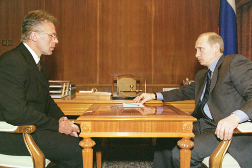 МОСКВА, КРЕМЛЬ. С известным хоккеистом Вячеславом Фетисовым.